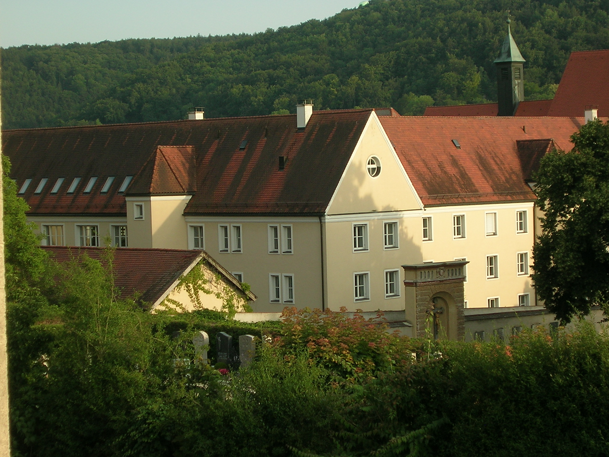 Ehemaliges Kapuzinerkloster Eichstätt. Jetzt Gebäude der Universität Eichstätt-Ingolstadt